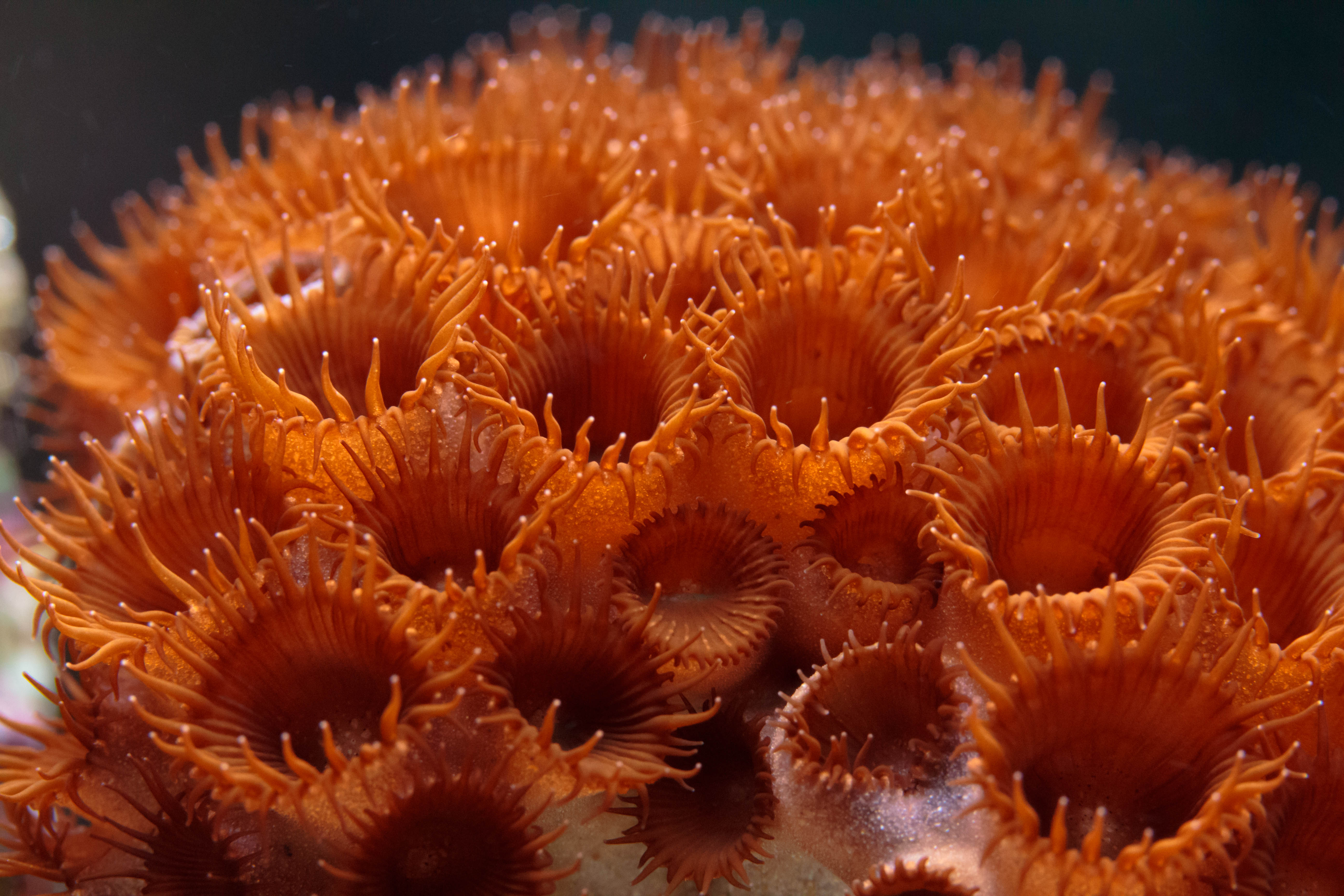 Colonia de Palythoa sp